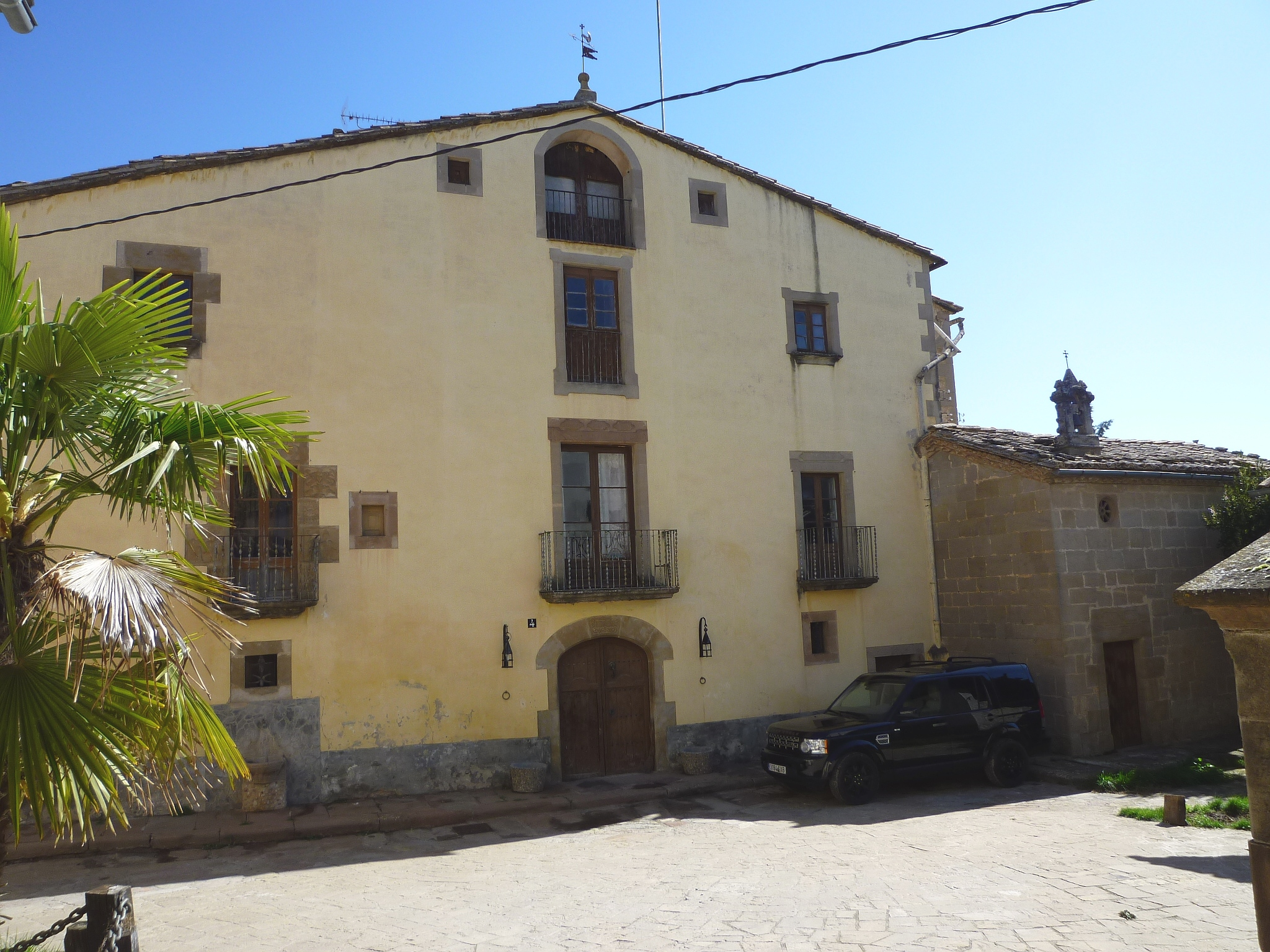 Les Cases de Matamargó (Pinós): amb la petita capella